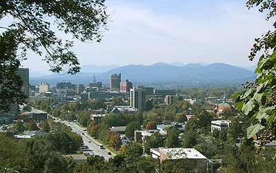 Foto do centro da cidade, tirada em uma casa nas colinas.